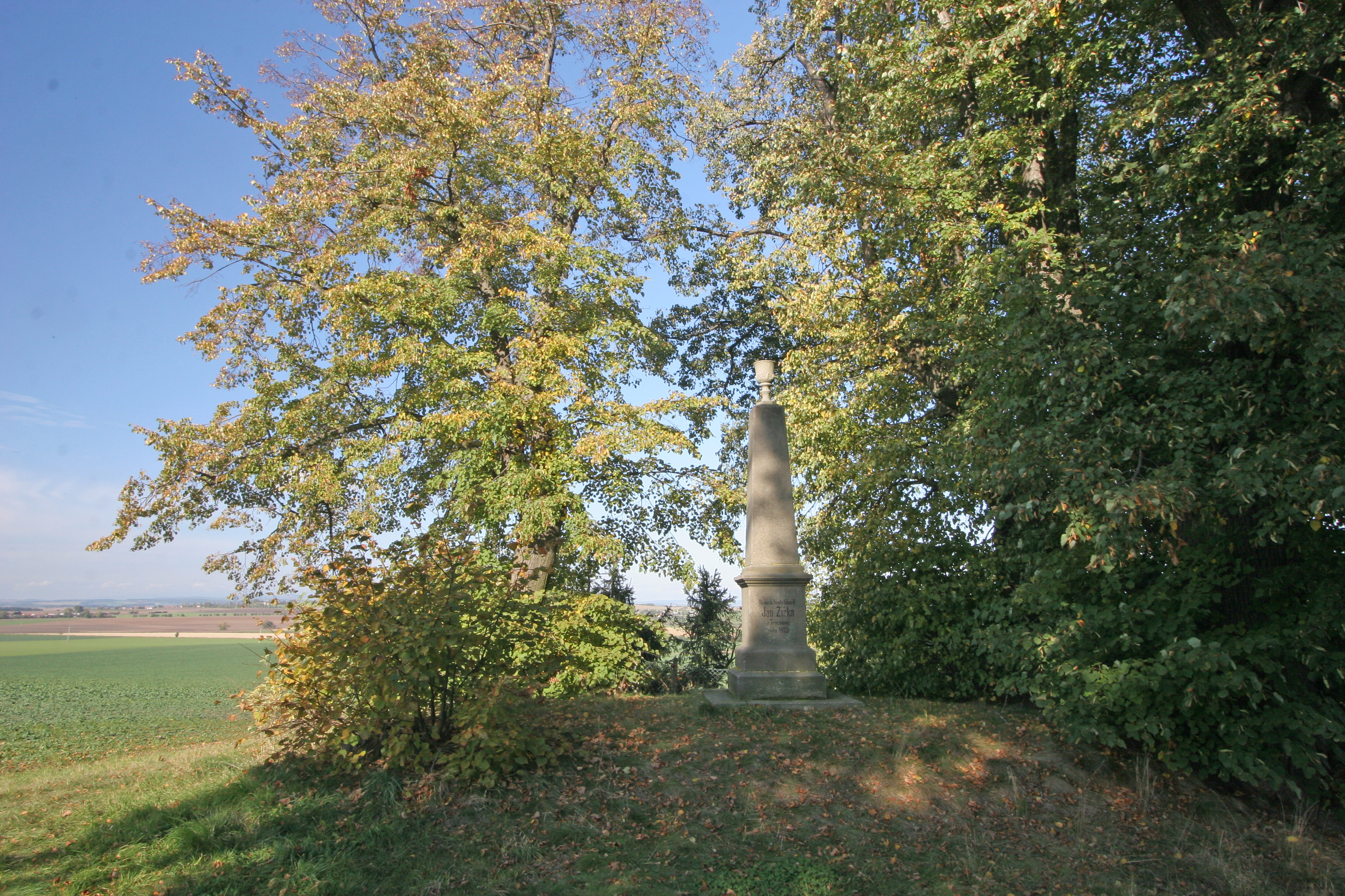 Pomník Žižkův stůl (Rosnice), ob. Nechanice, Rosnice